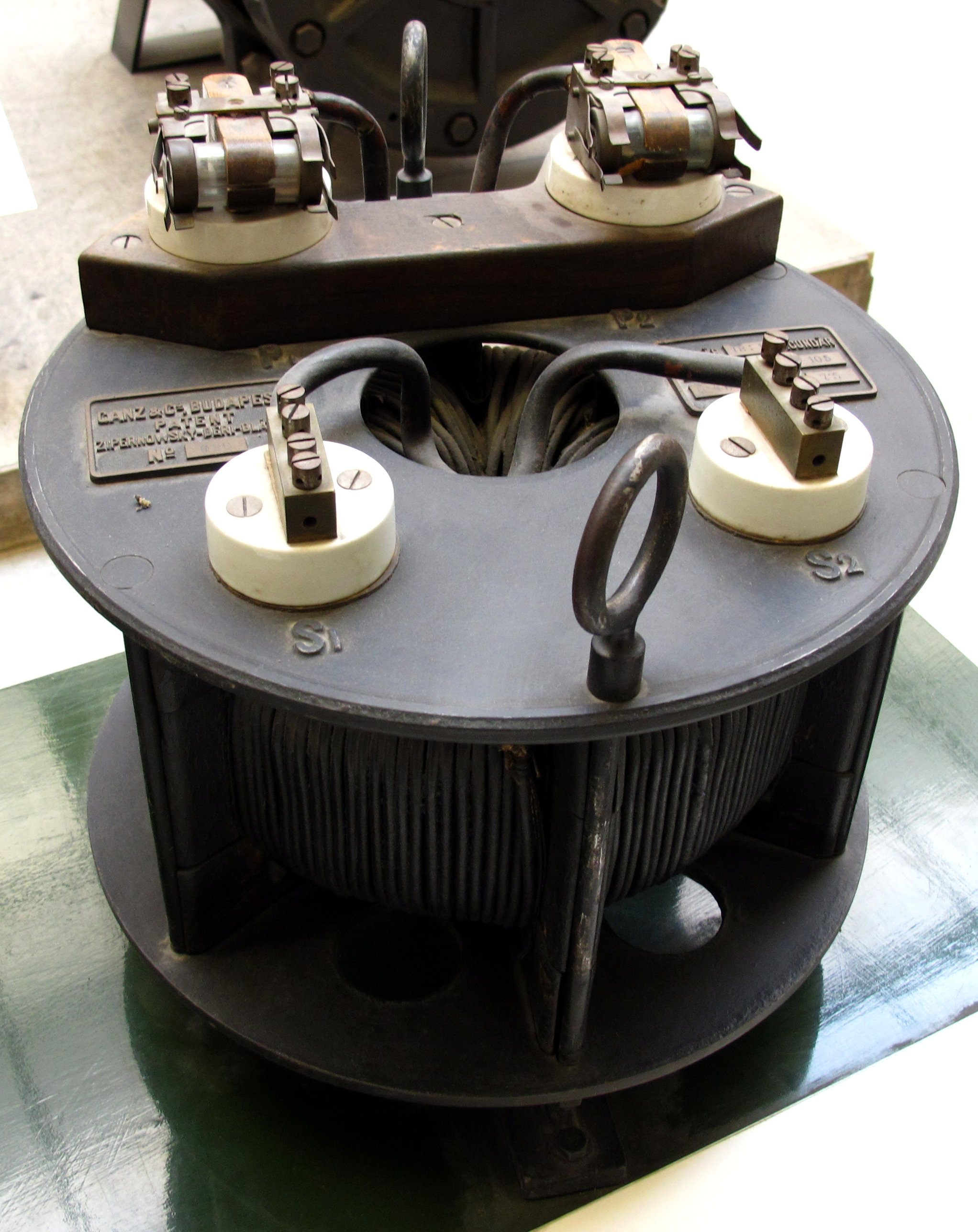 Früher Verteiltransformator ("Ortsnetztransformator") von Déri, Blathy und Zipernowsky aus 1885. Dieser und ähnliche frühe Transformatoren dienten ab 1886 der elektrischen Energieversorgung (Beleuchtung) in der Stadt Rom.